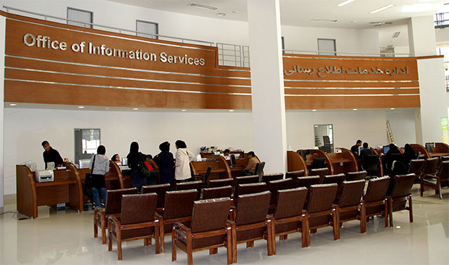 Information Services